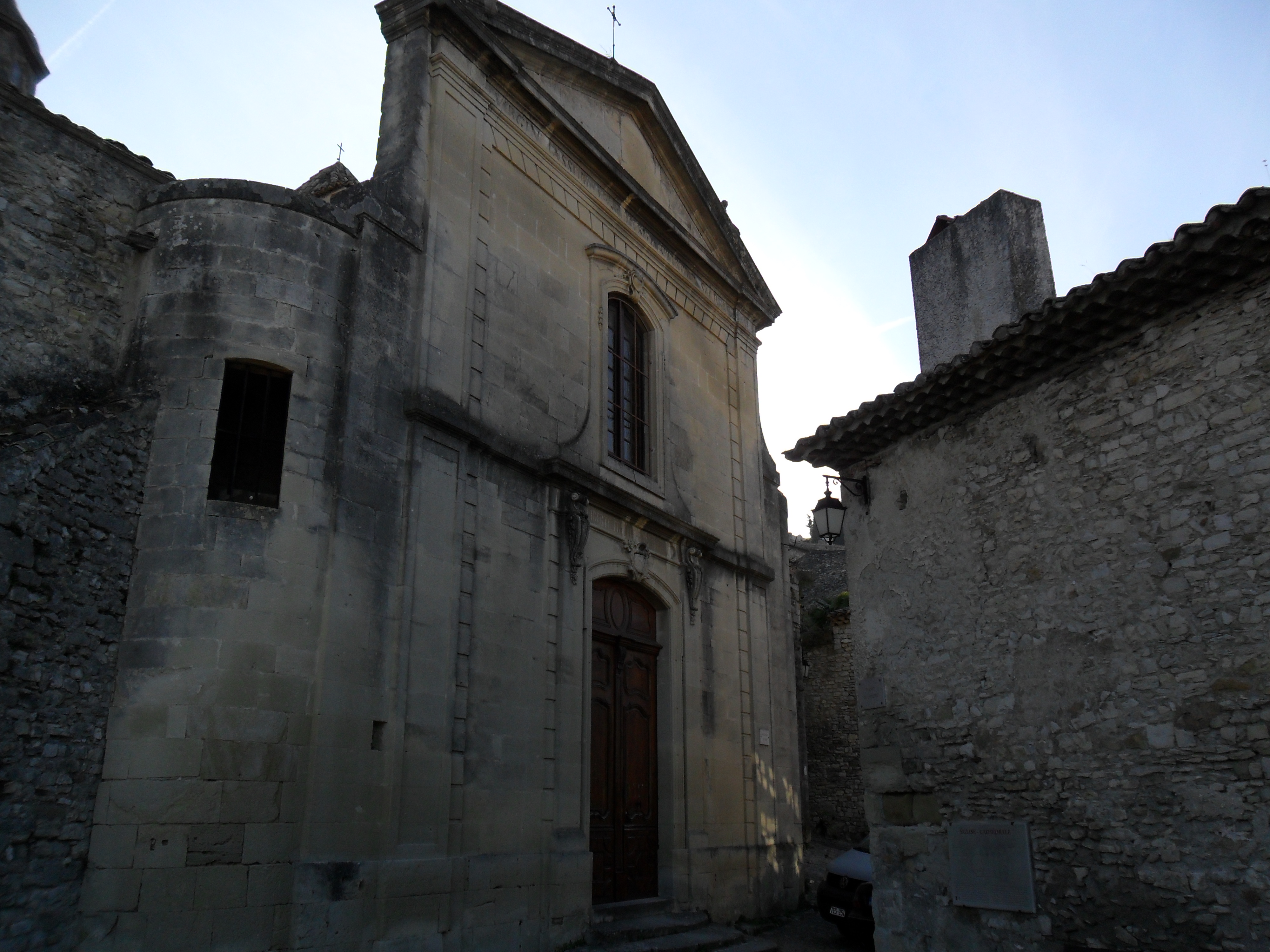 Vaison, Haute-Ville